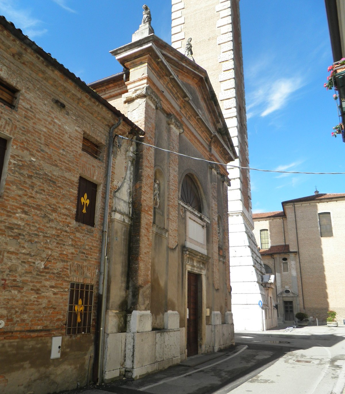 Facciata della chiesa di San Giuseppe a Lendinara (Rovigo)